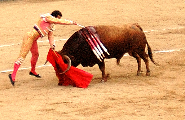 Victor Puerto entrando a matar.